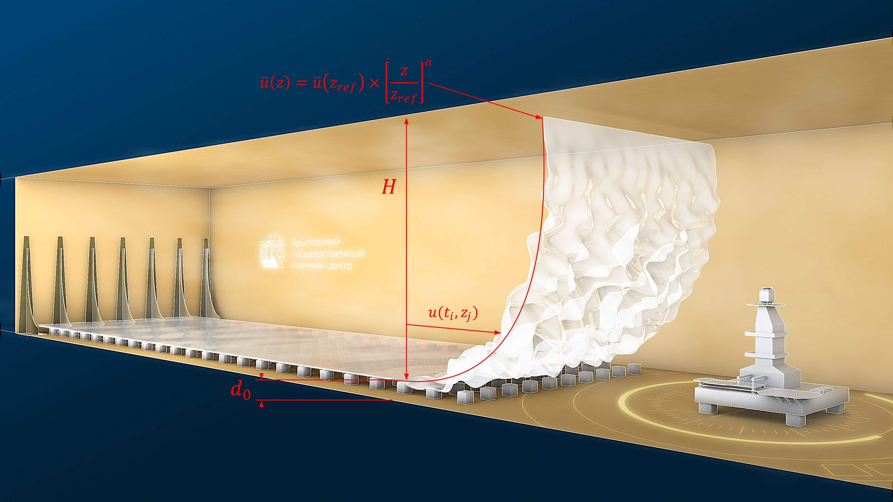 Изображение моделируемого пограничного слоя в ЛАТ Крыловского центра